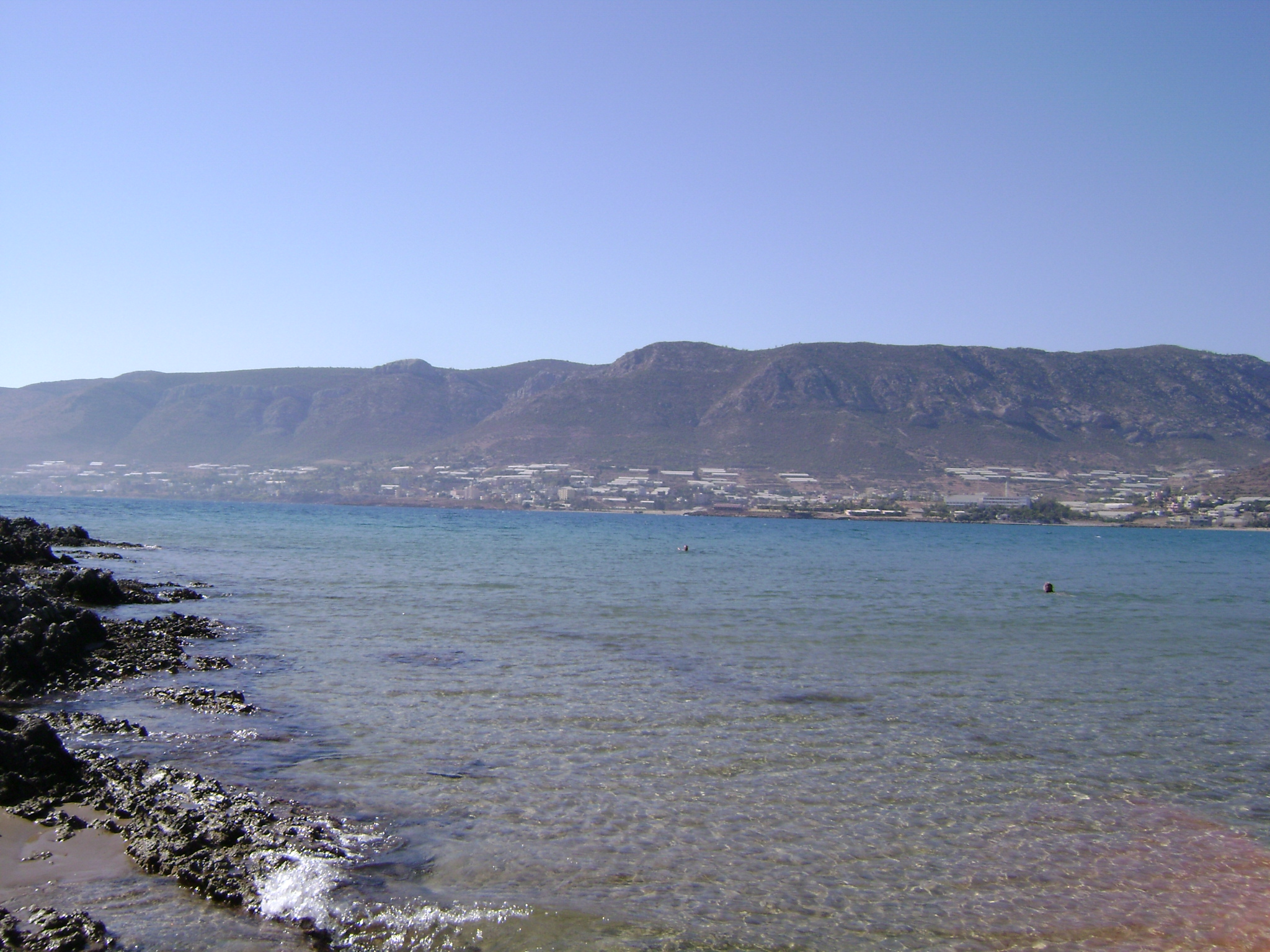 Aydıncık, Mersin